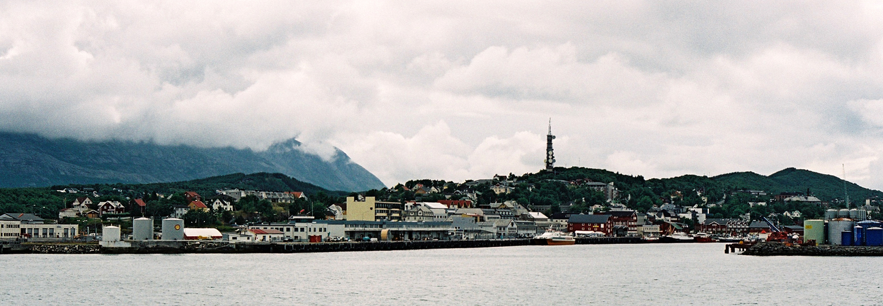 Sandnessjøen, Norway.